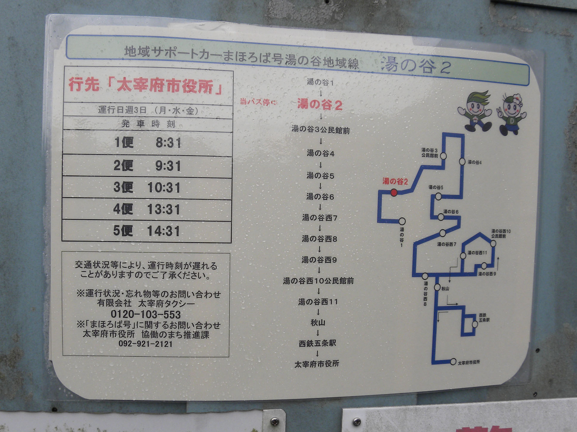 太宰府市「地域サポートカーまほろば号湯の谷地域線」のバス停